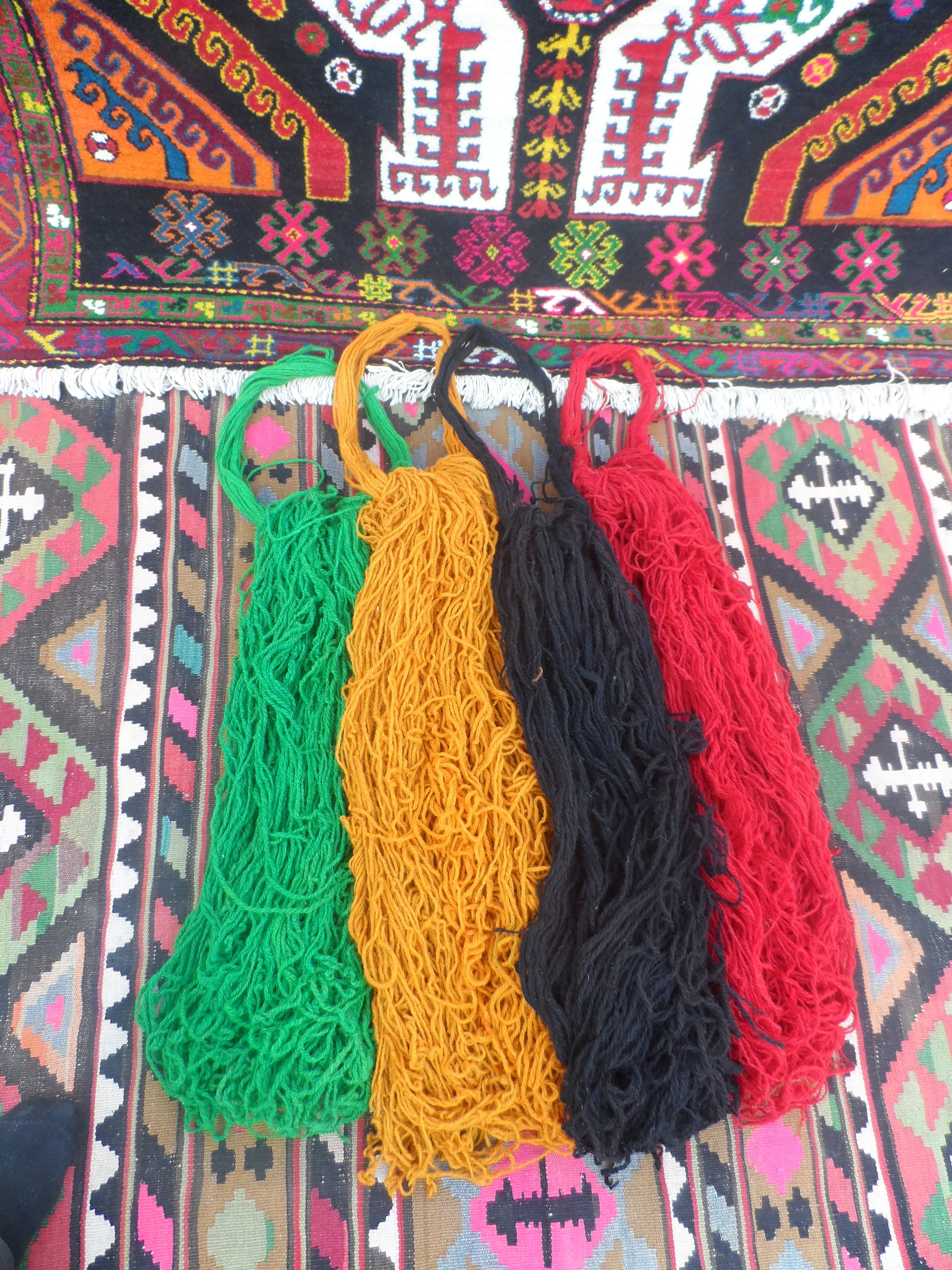 Xalça toxumaq üçün tovlanıb və boyanıb hazırlanmış yun iplik kələfi.